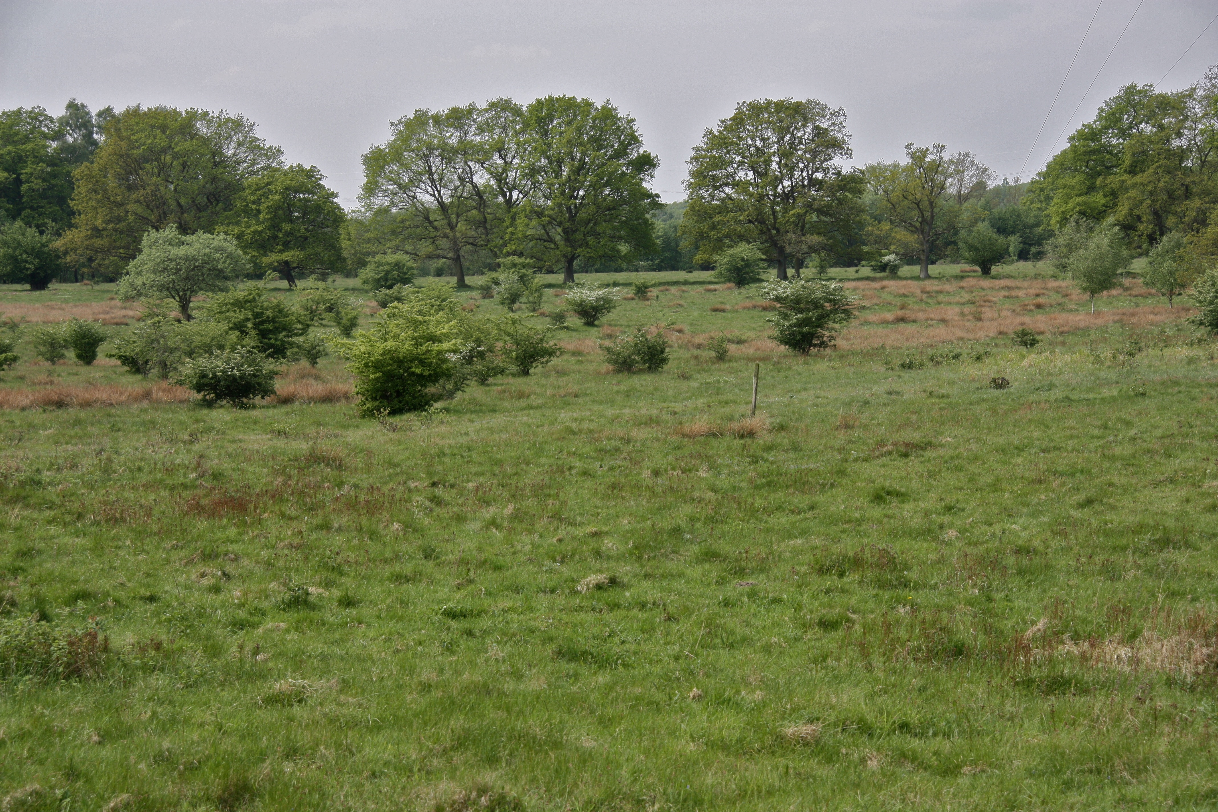 Hamburg, Rahlstedt, Naturschutzgebiet Höltigbaum, Wiesen oberhalb des Wandsetals